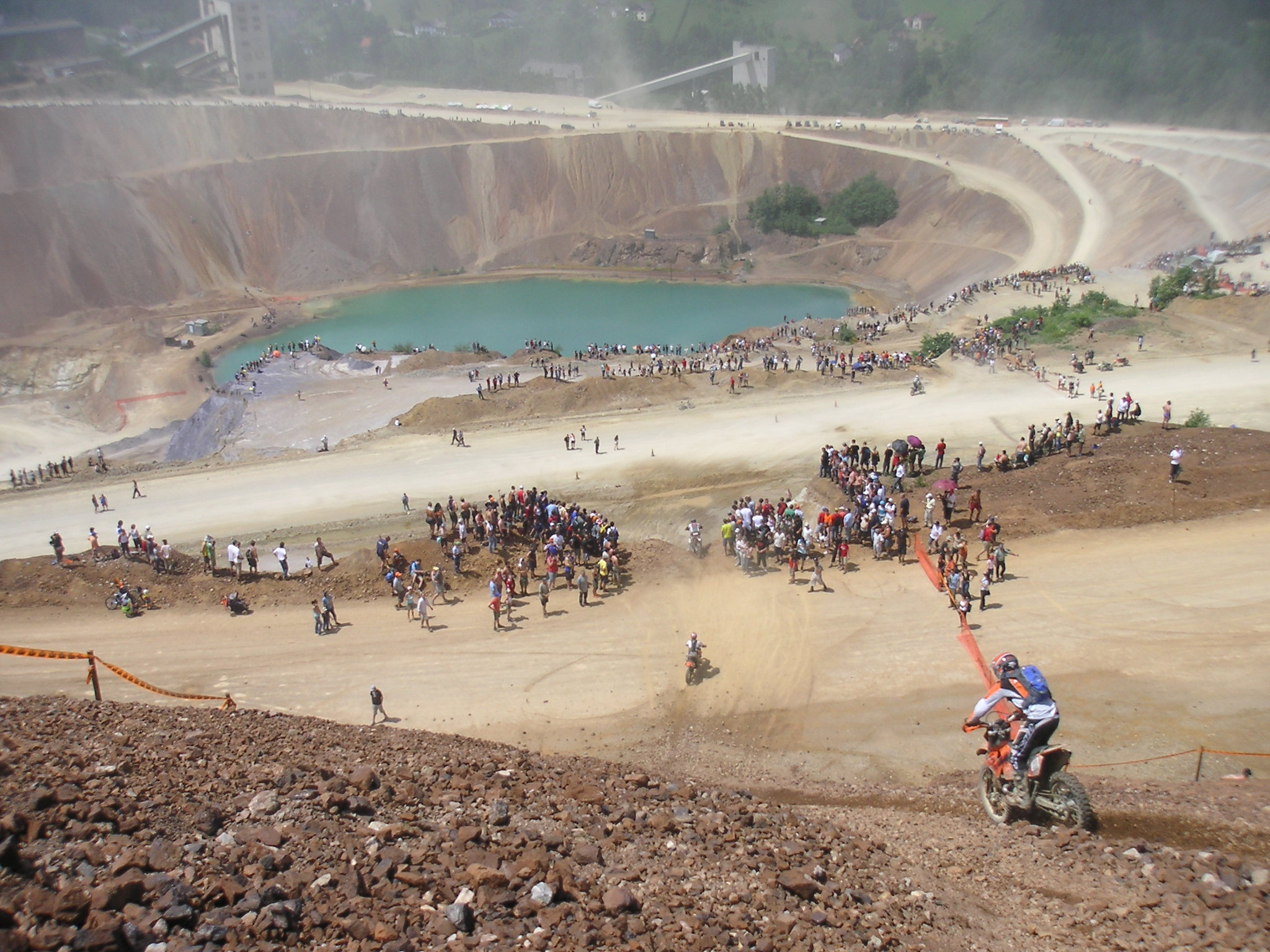 ErzbergRodeo 2007, Startarea HareScramble